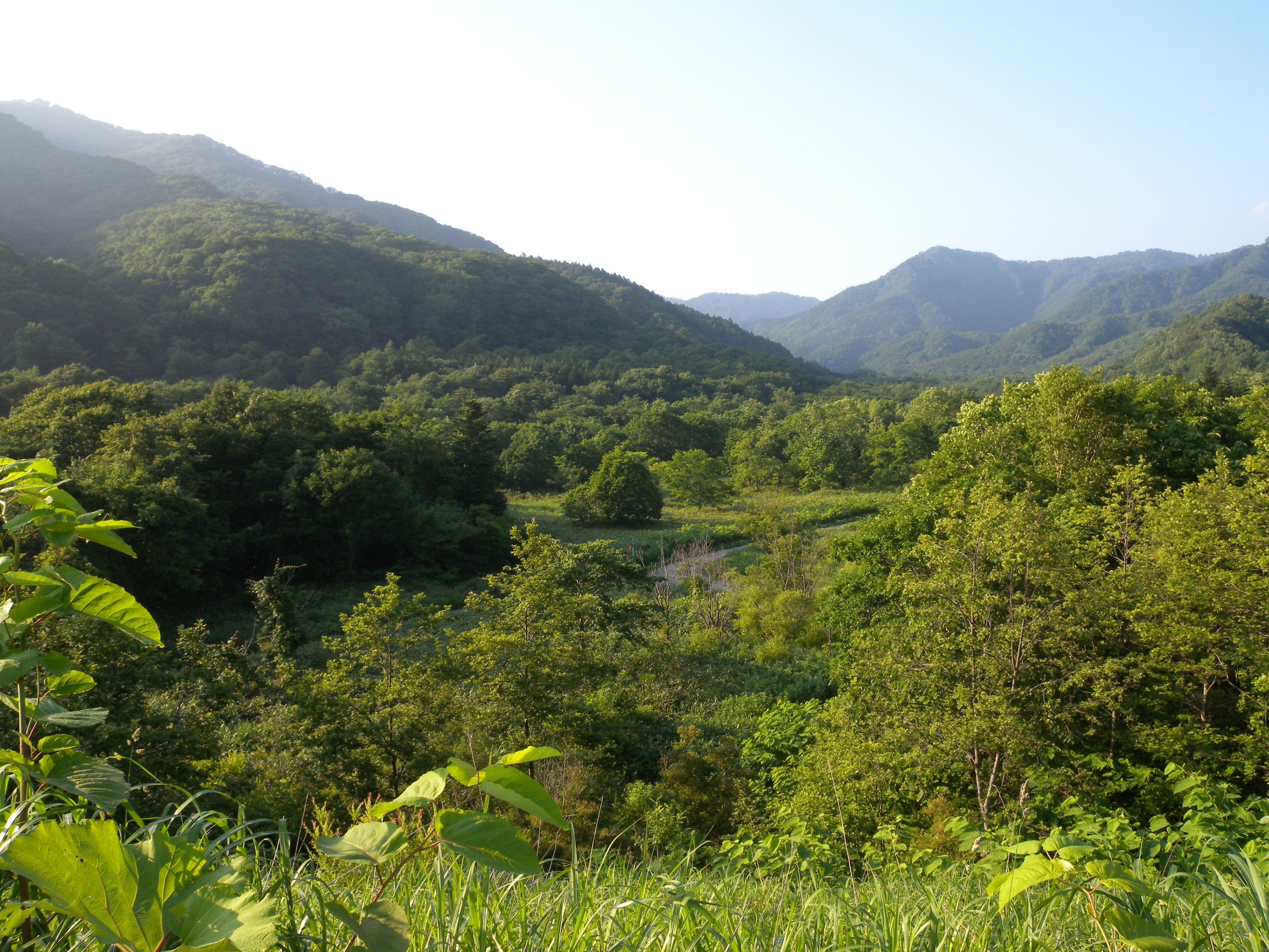 北海道檜山郡厚沢部町に所在する天然記念物「鶉川ゴヨウマツ自生北限地帯」の下流側。鶉川上流部。